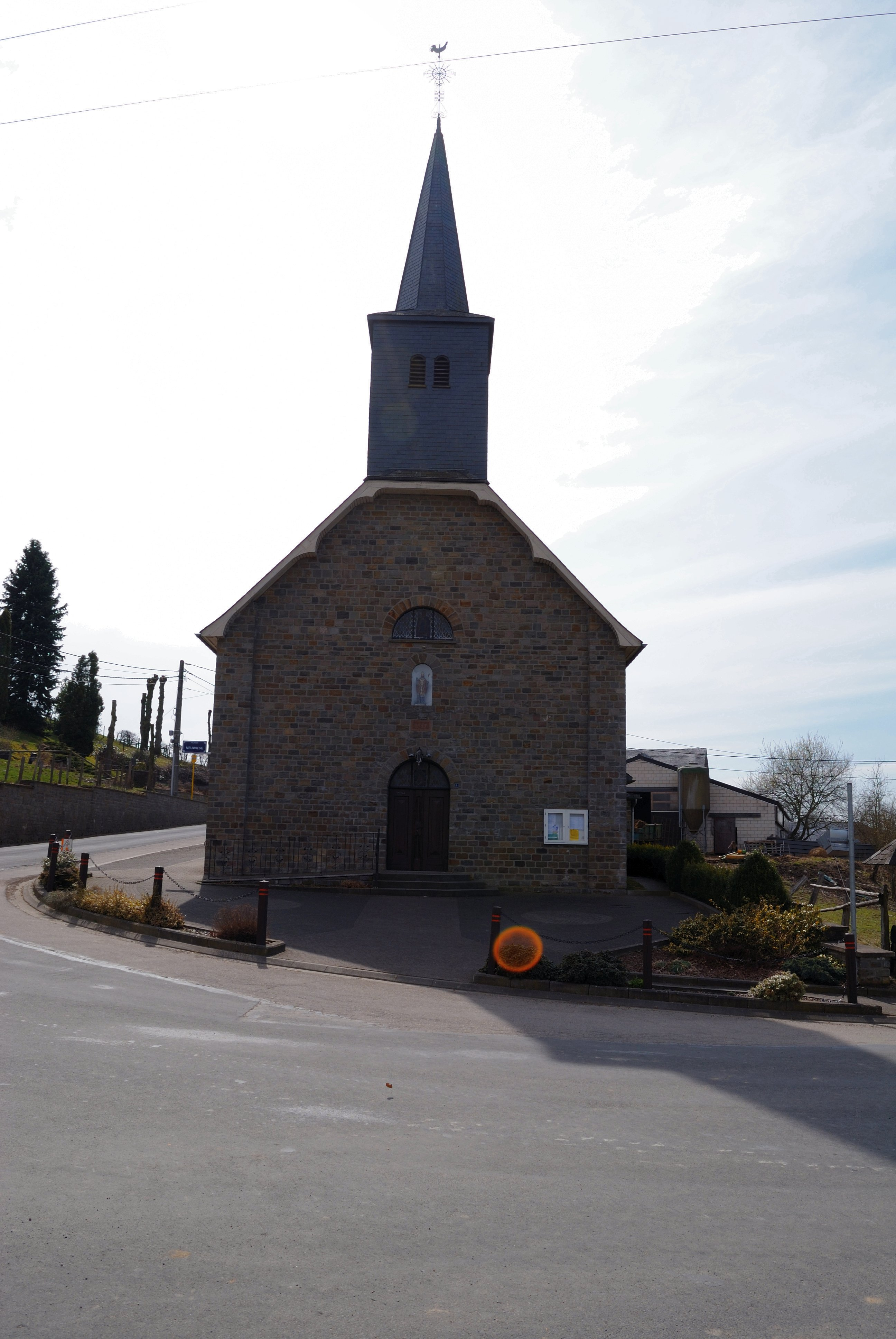 De kerk van Valender.